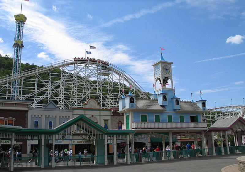 Main entrance, Lake Compounce amusement park, Bristol, CT, USA